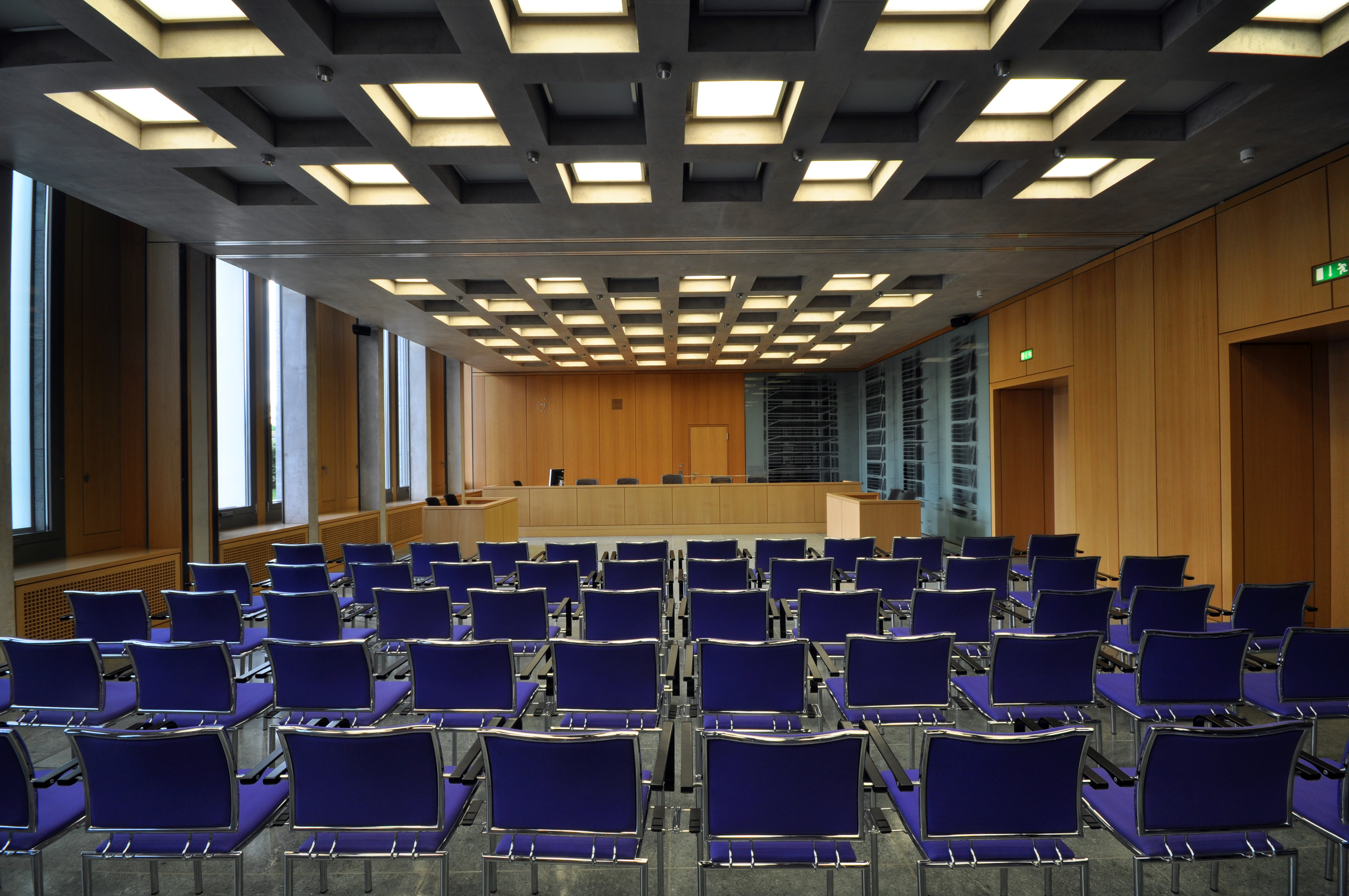 Bundesarbeitsgericht Erfurt